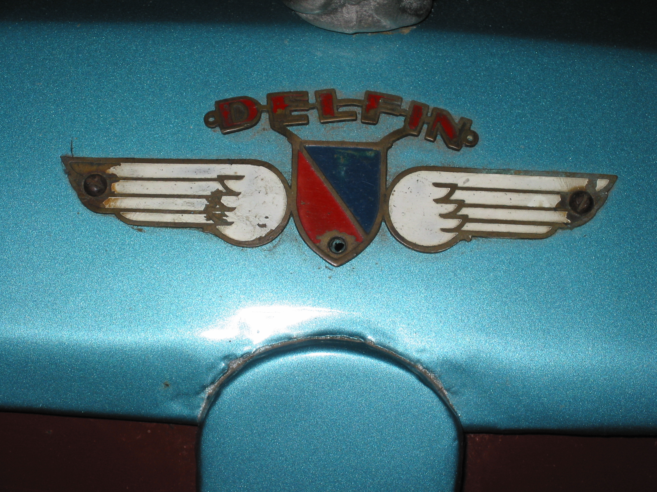 Emblem Delfín 1954